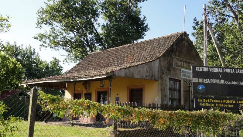 Estación Punta Lara del FCGR, ex FCBAPE.